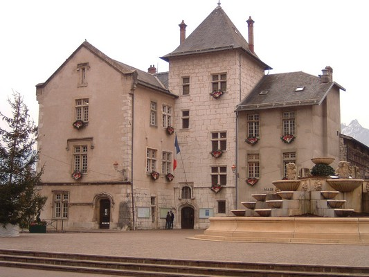 Hôtel de ville de la commune fraiçaise Aix-les-Bains dans le département de la Savoie. On peut visiter le Musée Lapidaire qui est Adossé à l’Hôtel de ville, cet ancien temple gallo-romain, dit Temple de Diane, fut reconverti en musée archéologique.